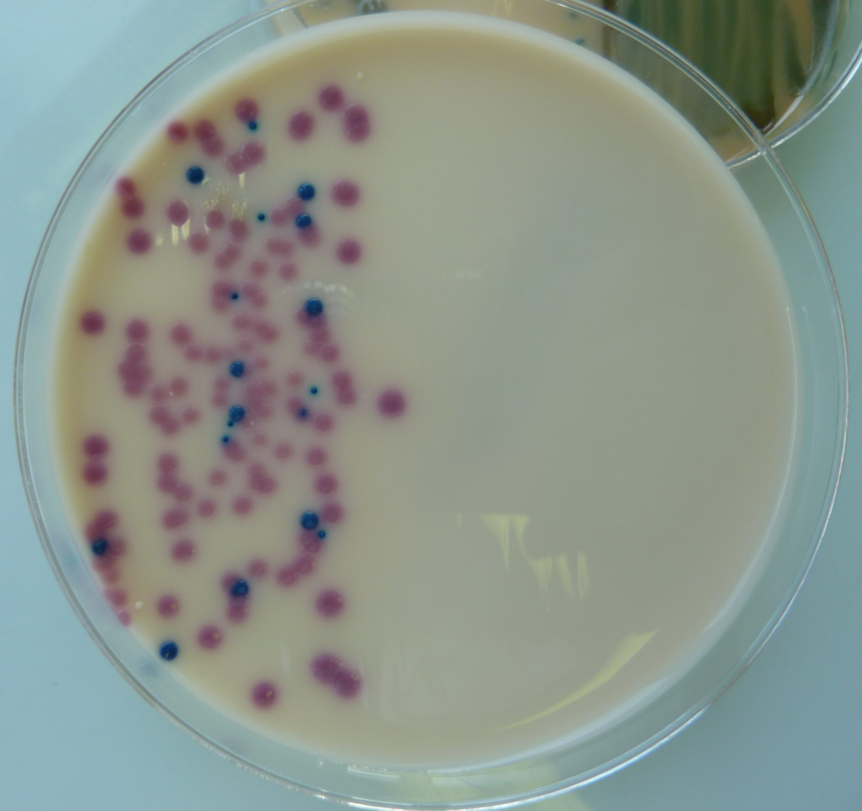 Dénombrement dans les urines - milieu UTI